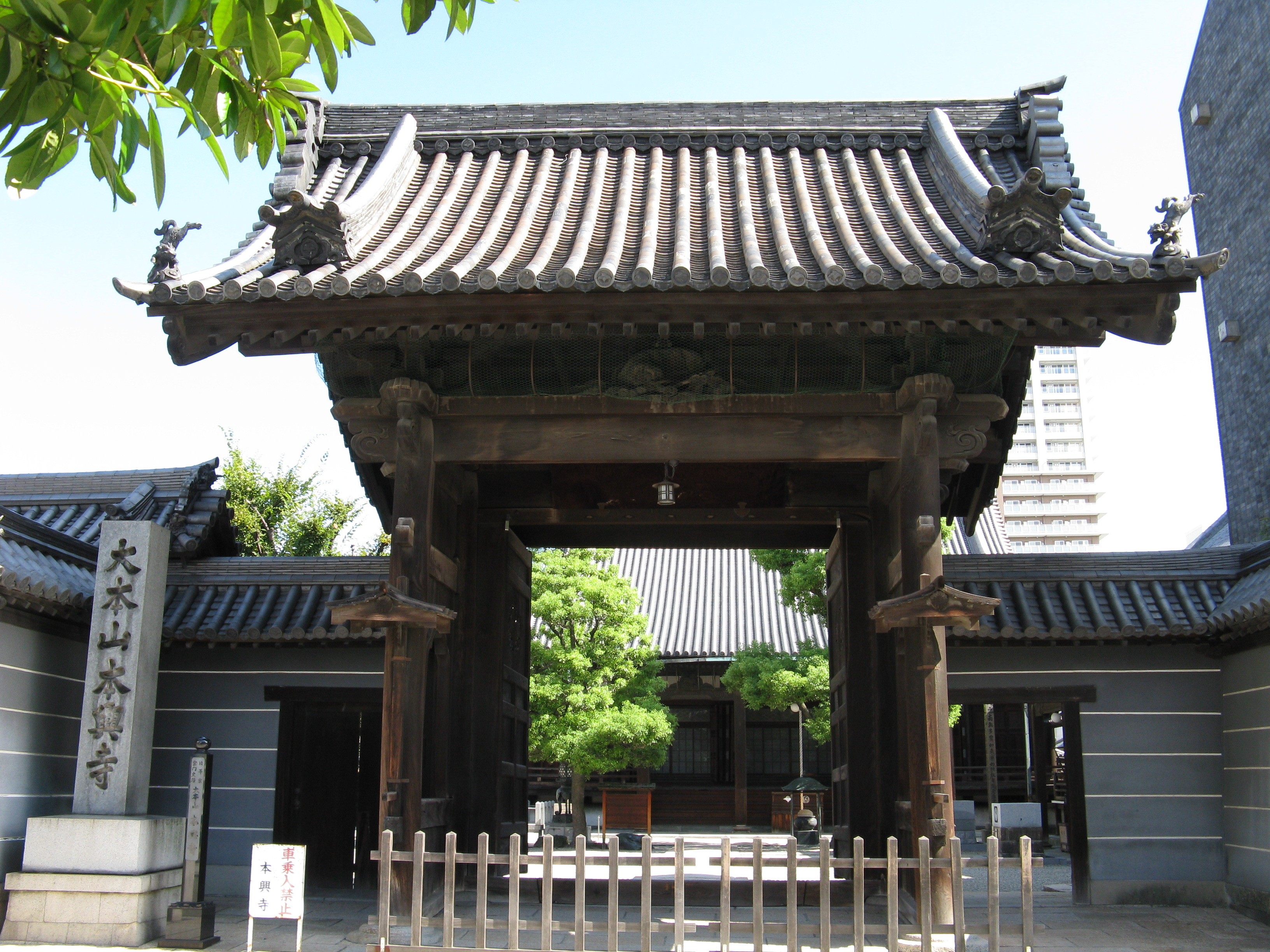 本興寺